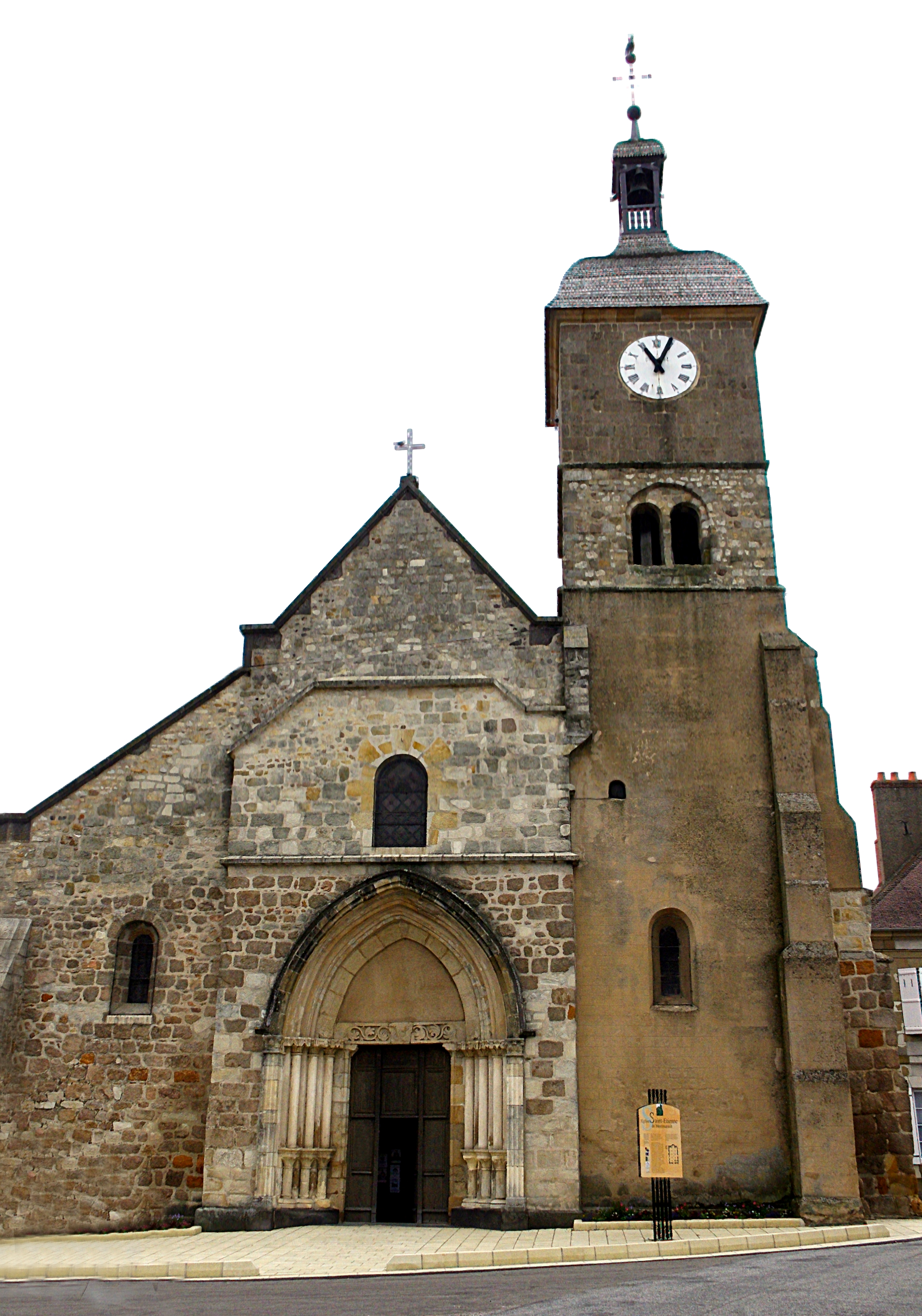 L'église Saint Étienne à Montmarault, Allier, France